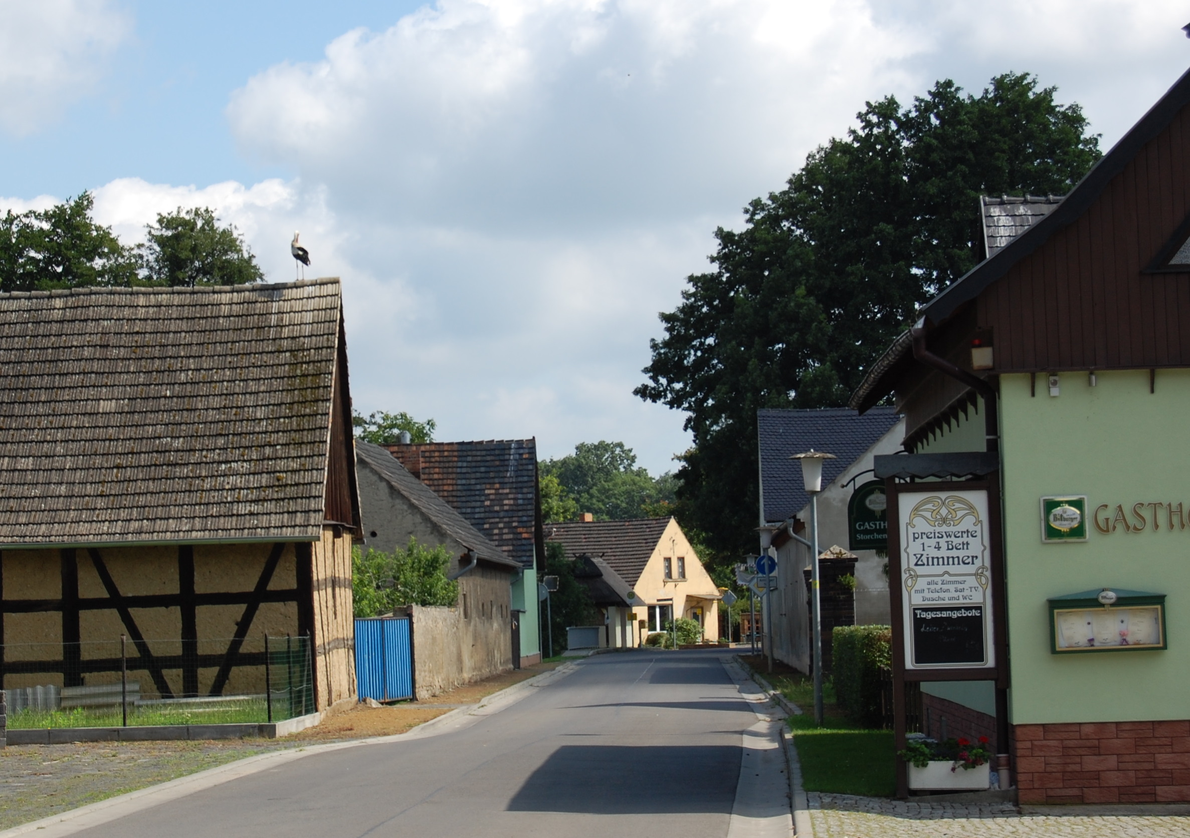 Straße durch Naundorf (Vetschau), Storch auf Hausdach Hornjoserbsce: Dróha přez Njabožkojce (město Wětošow)